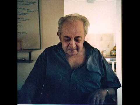 Teologo della Teologia del popolo